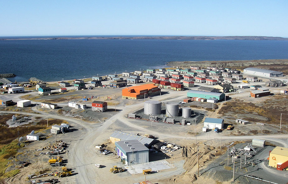 Umiujaq - Hudson Bay - Qc